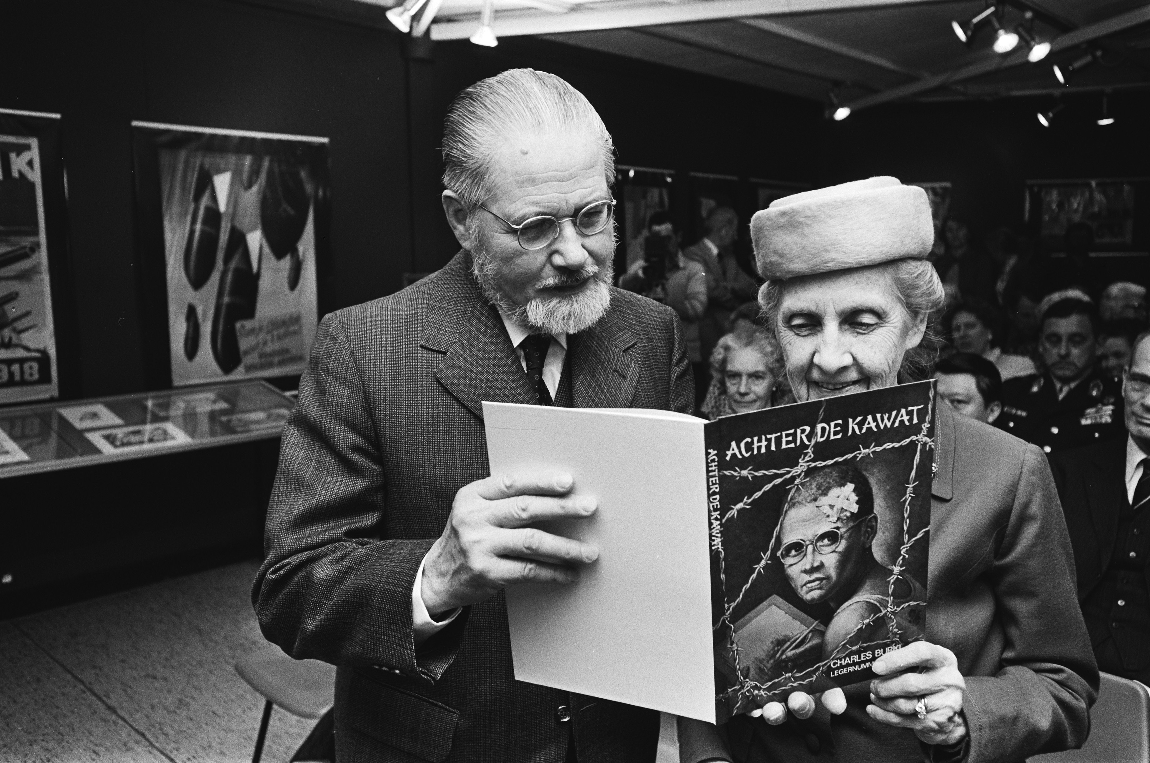 Collectie / Archief : Fotocollectie Anefo Reportage / Serie : [ onbekend ] Beschrijving